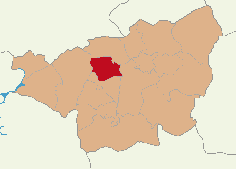 Eğil ilçesinin konumu